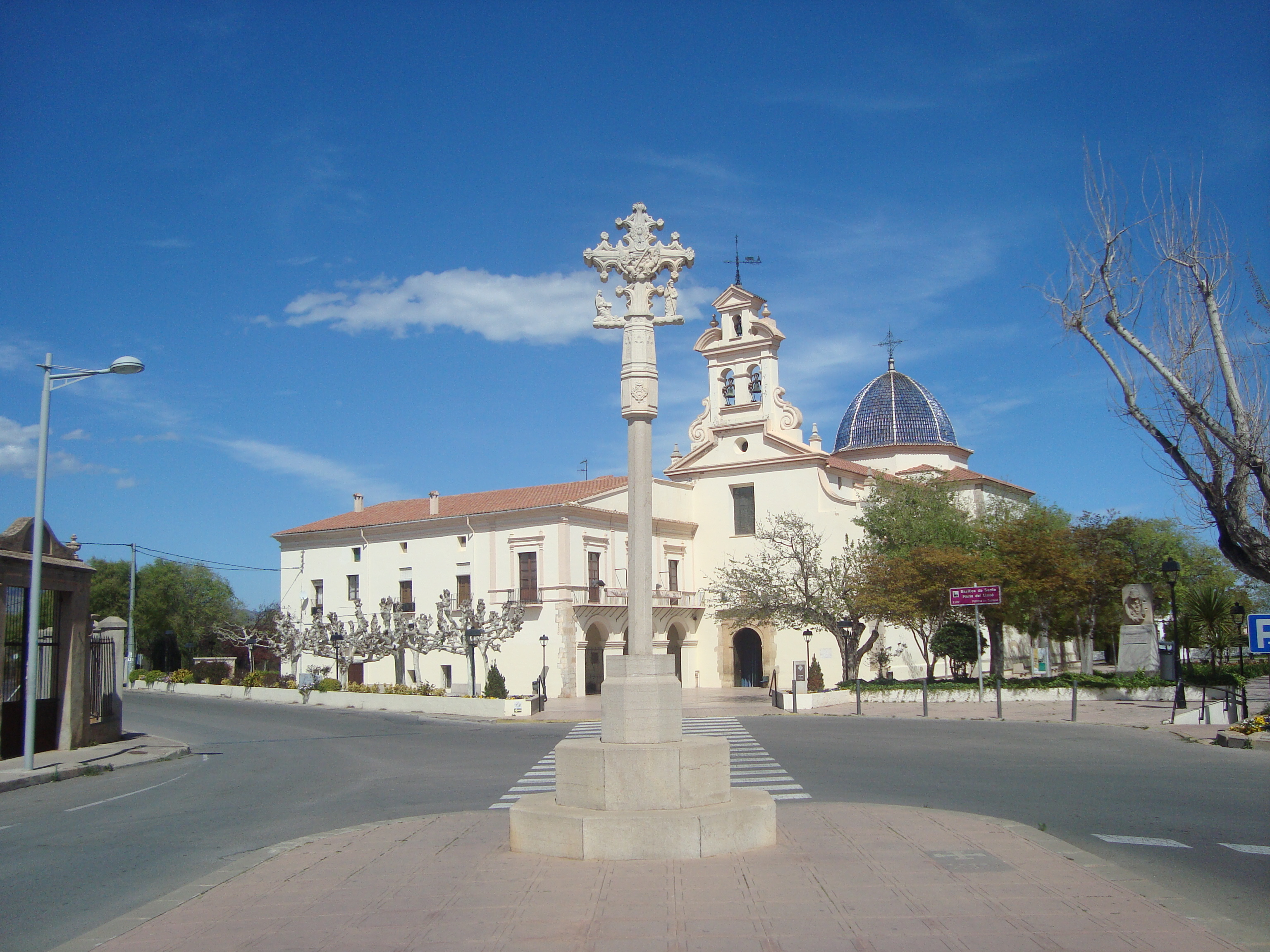 Basílica de la Mare de Déu del Lledó (Castelló de la Plana) 05.040-001.